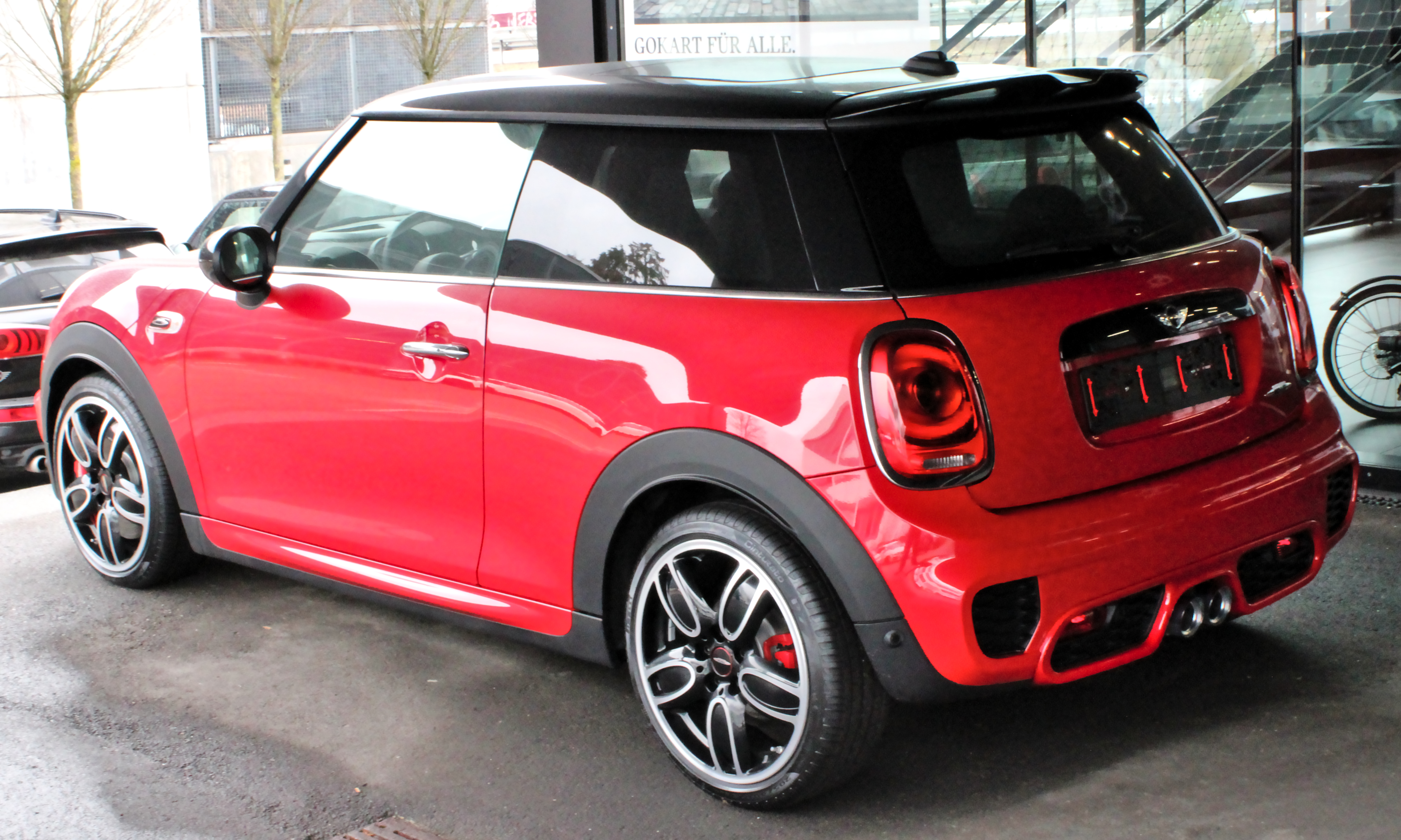 Mini F56 JCW in Stuttgart-Vaihingen